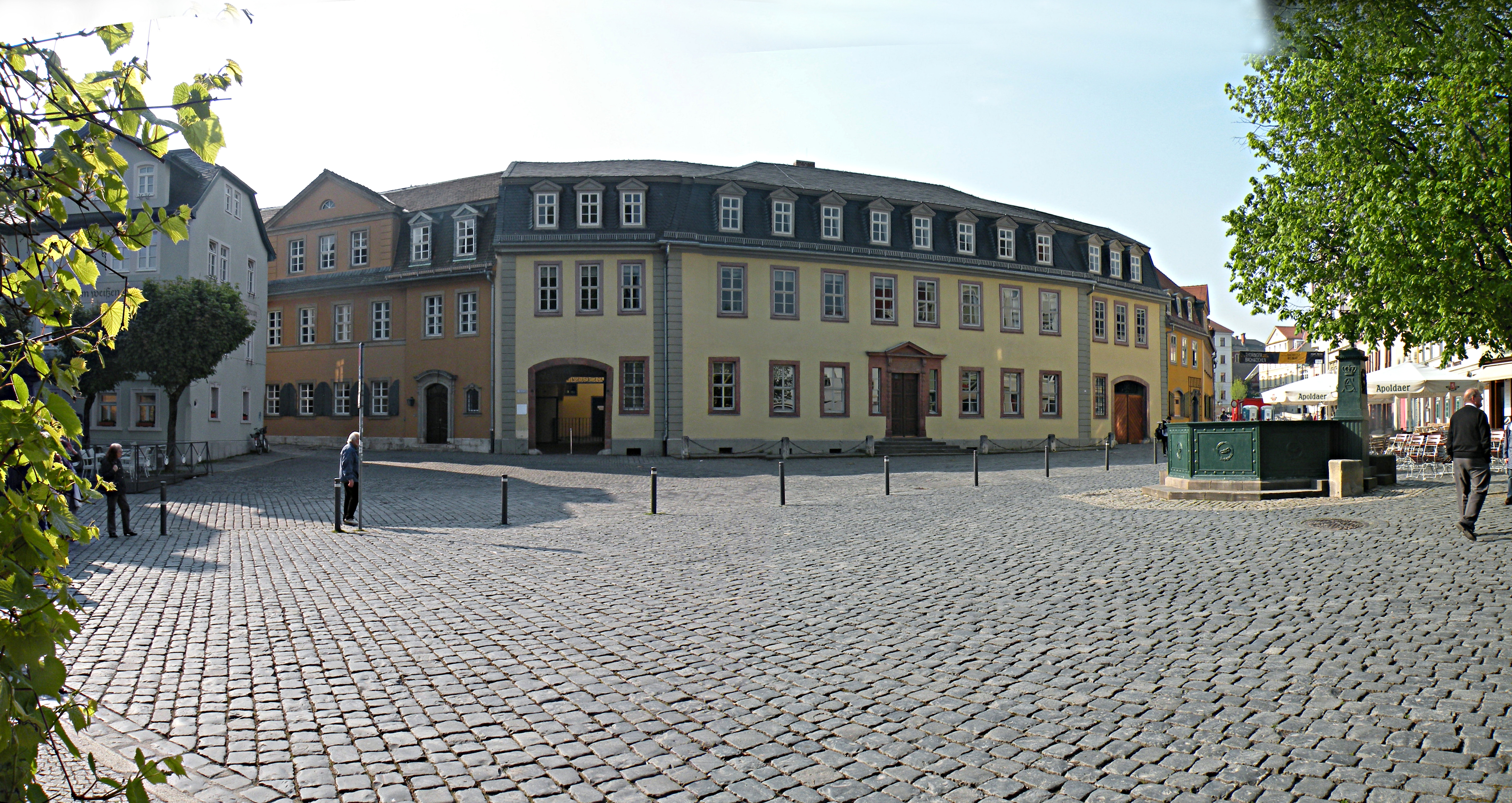 Дом Гёте